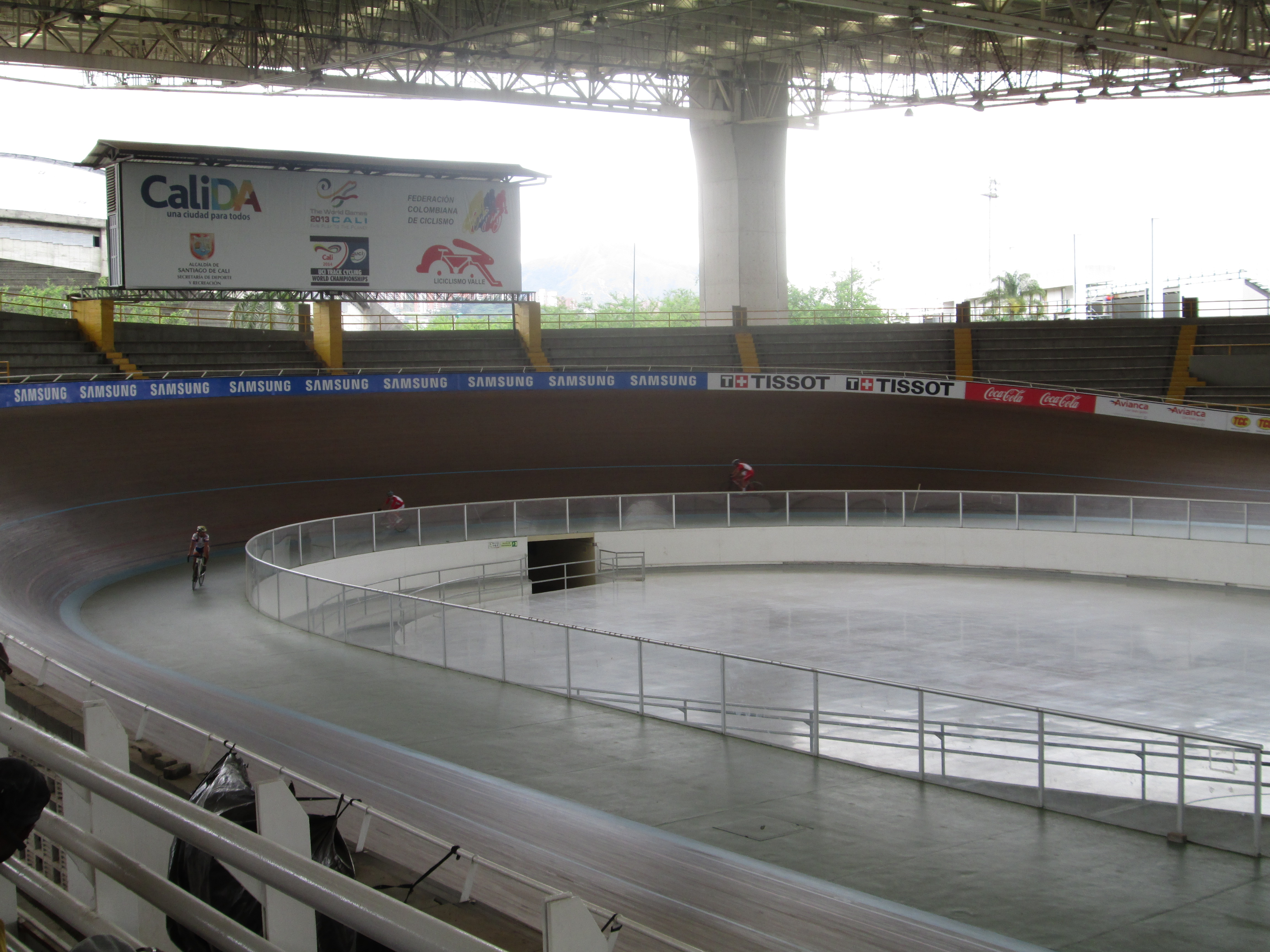 Interior velodromo Alcides Nieto